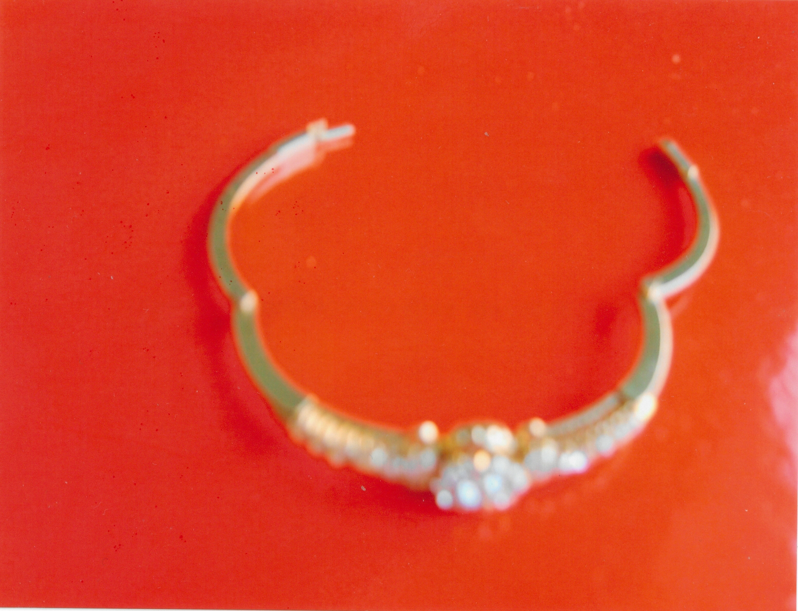 Bracciale trasformabile in diadema, monile donato da Vittorio Emanuele II alla Marchesa Giulia Parisi, moglie di Nicola Cimorelli, riconoscente per averlo ospitato, il 24 Ottobre 1860, nel Palazzo Cimorelli di Venafro (IS)